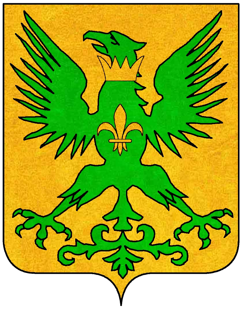 Stemma della famiglia Alidosi